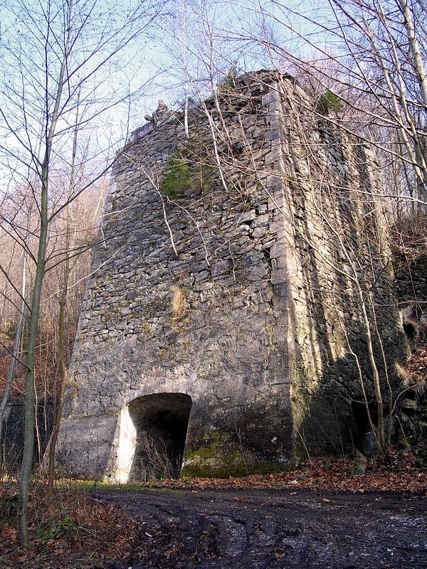 Stary wapiennik (1934) w Rogóżce (gmina Stronie Śląskie, Dolny Śląsk).